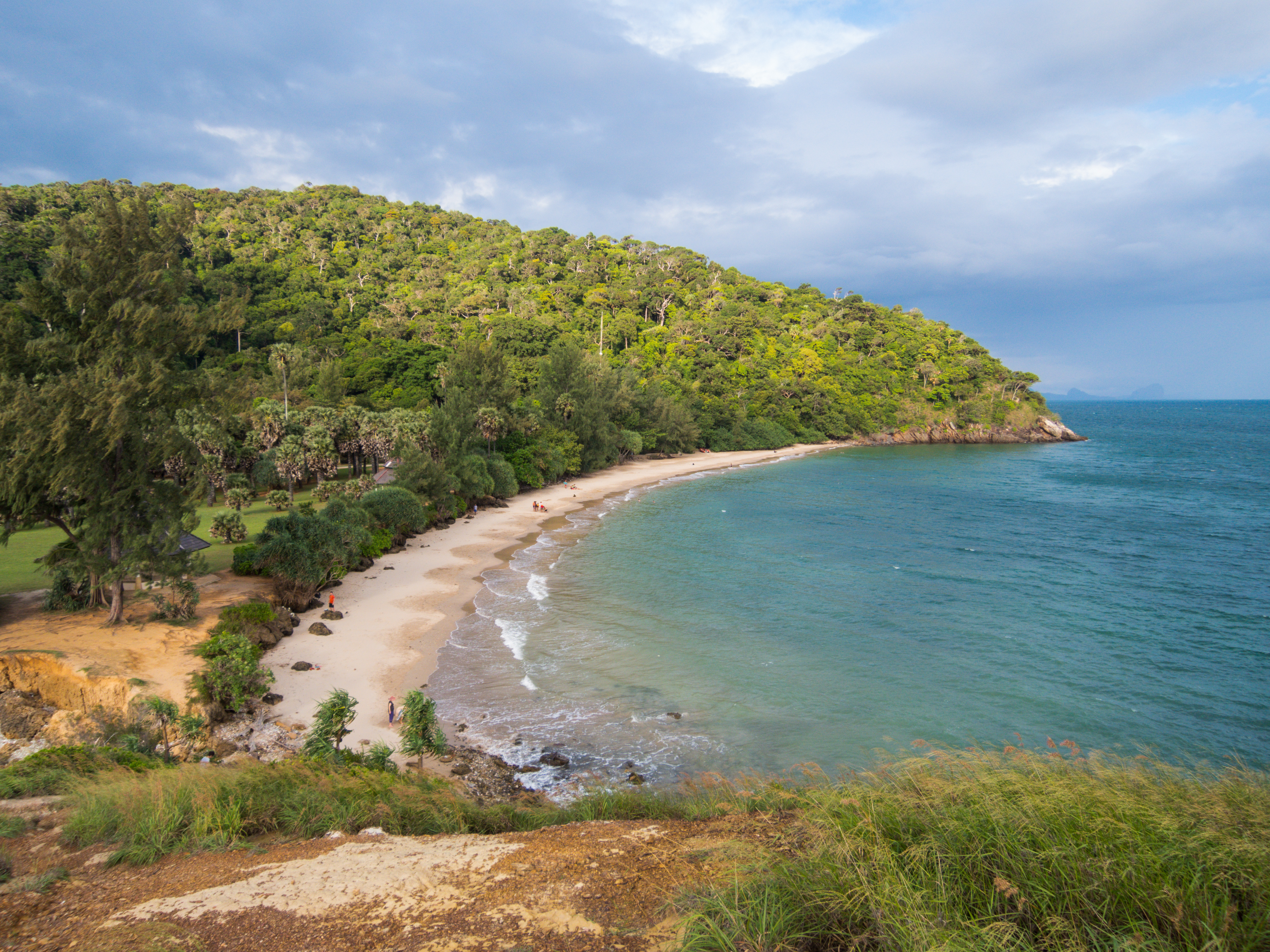 Eine der schönsten Strände in Thailand. One of the best beaches in Thailand.